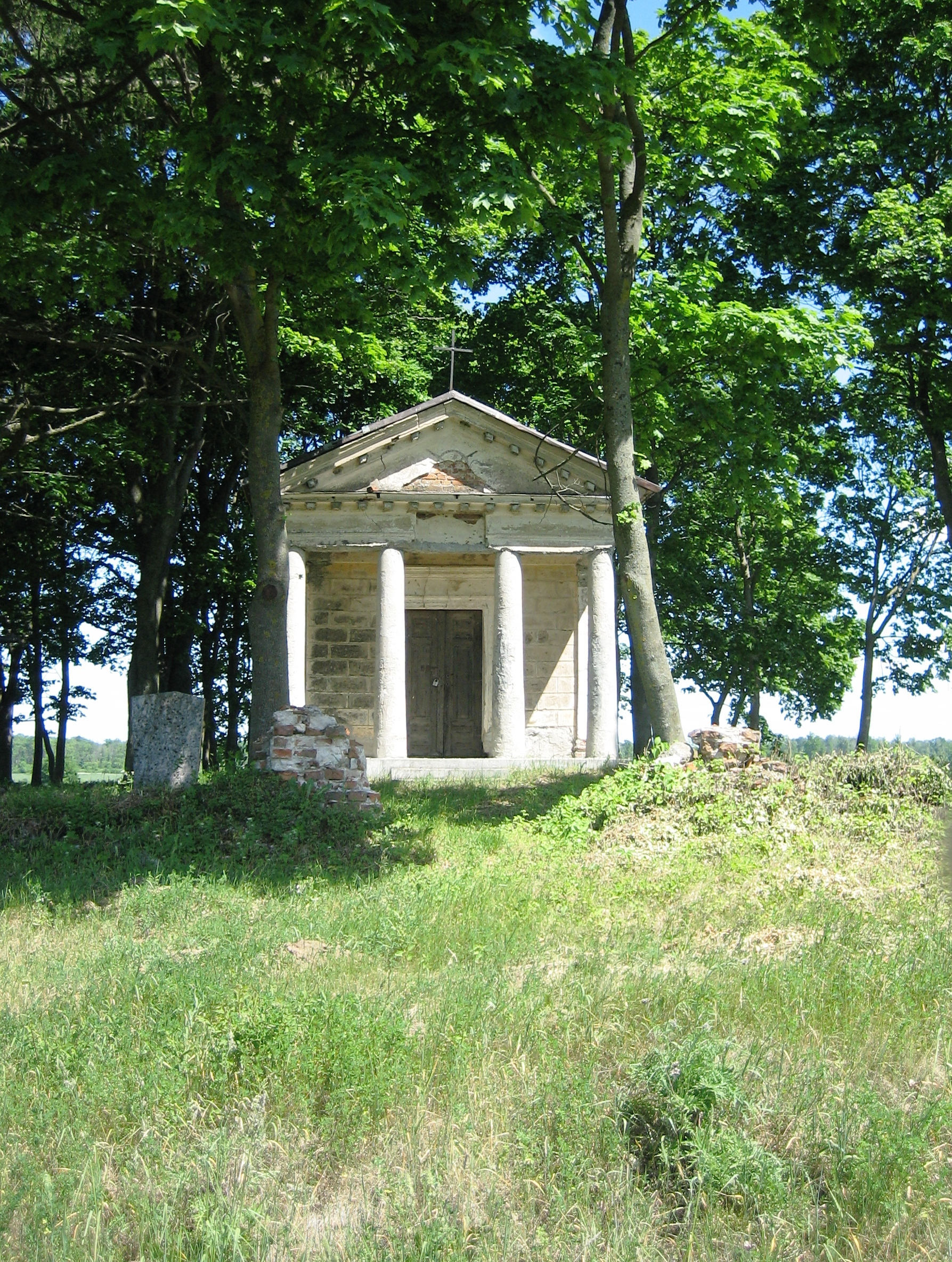 Senosios Daumantiškių kapinės